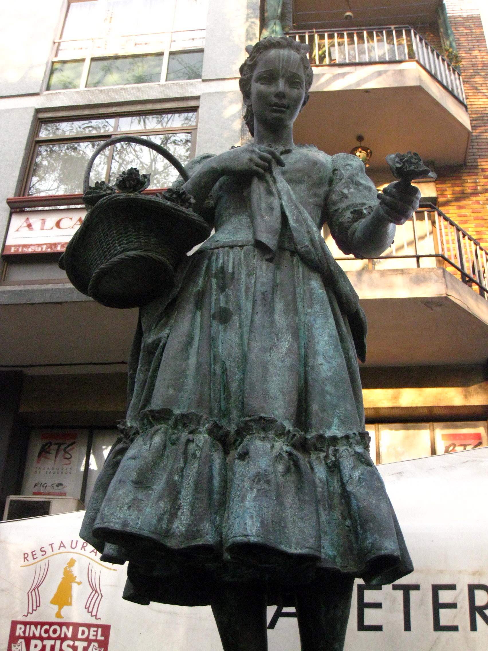 Font de la Violetera. C. Nou de la Rambla - av. Paral·lel (Barcelona)